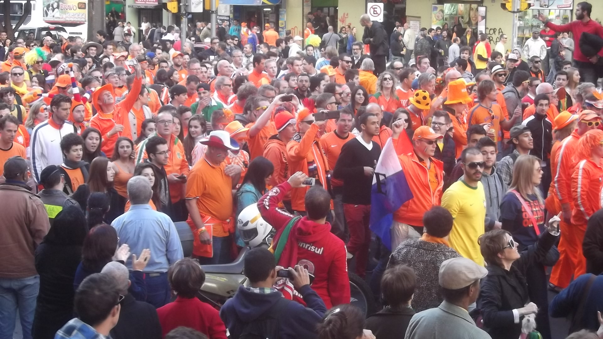 Copa FIFA 2014 - Torcedores dos Países Baixos em Porto Alegre - 2014-06-18